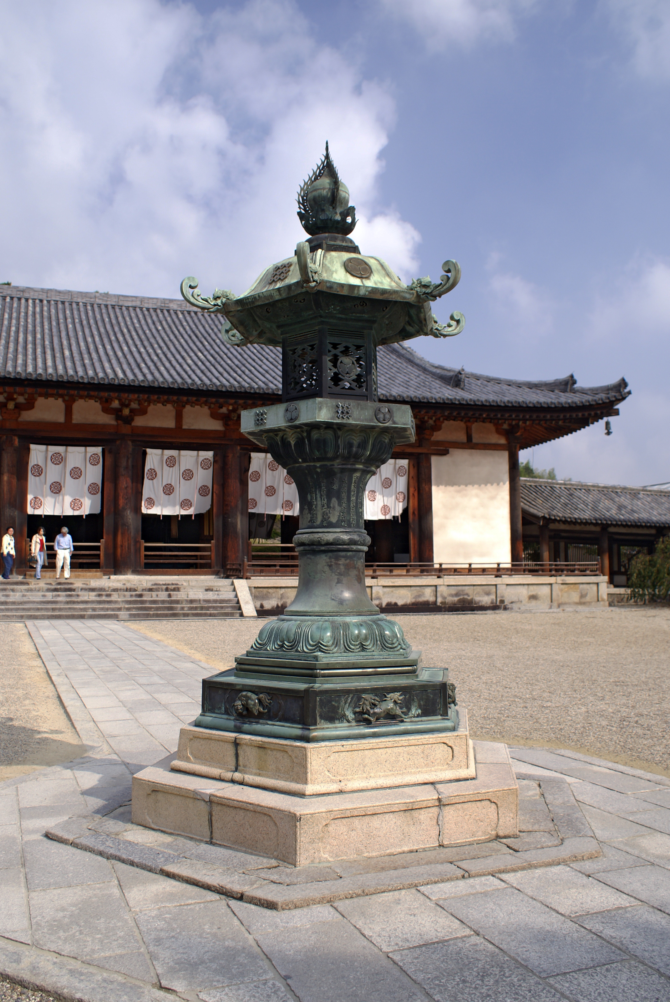 Horyu-ji in Ikaruga, Nara, Japan